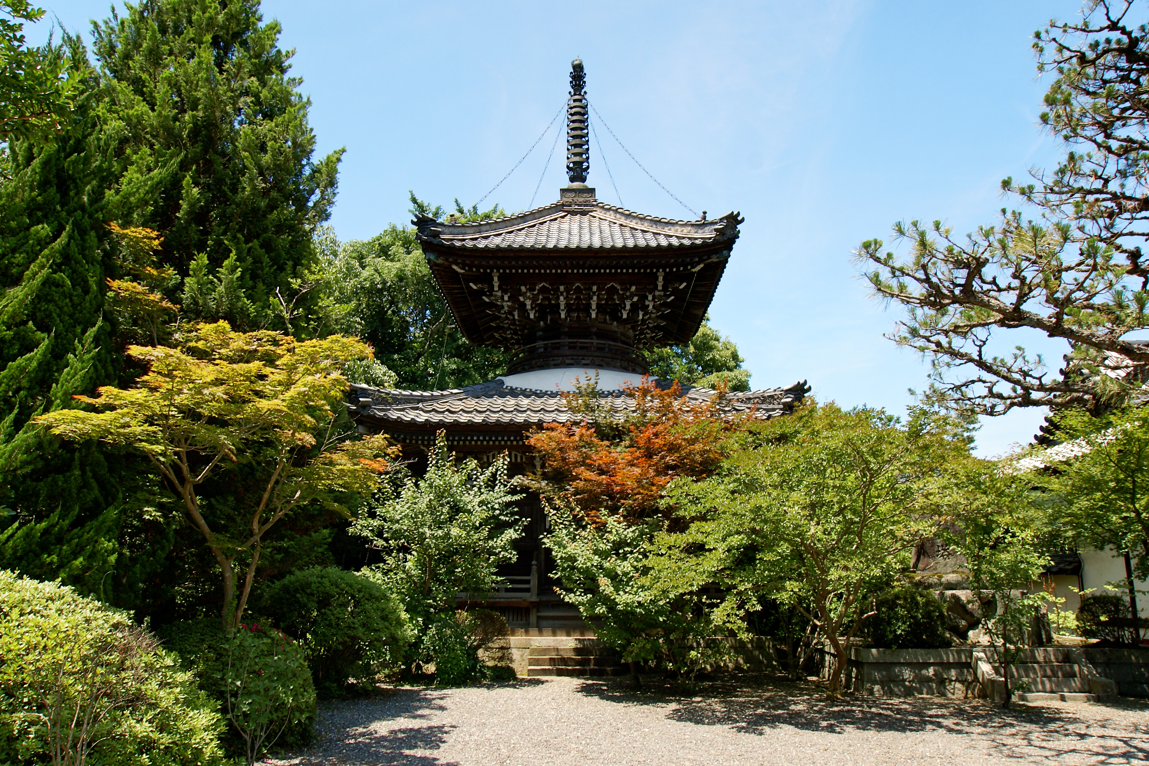 Anaoji in Kameoka, Kyoto prefecture, Japan